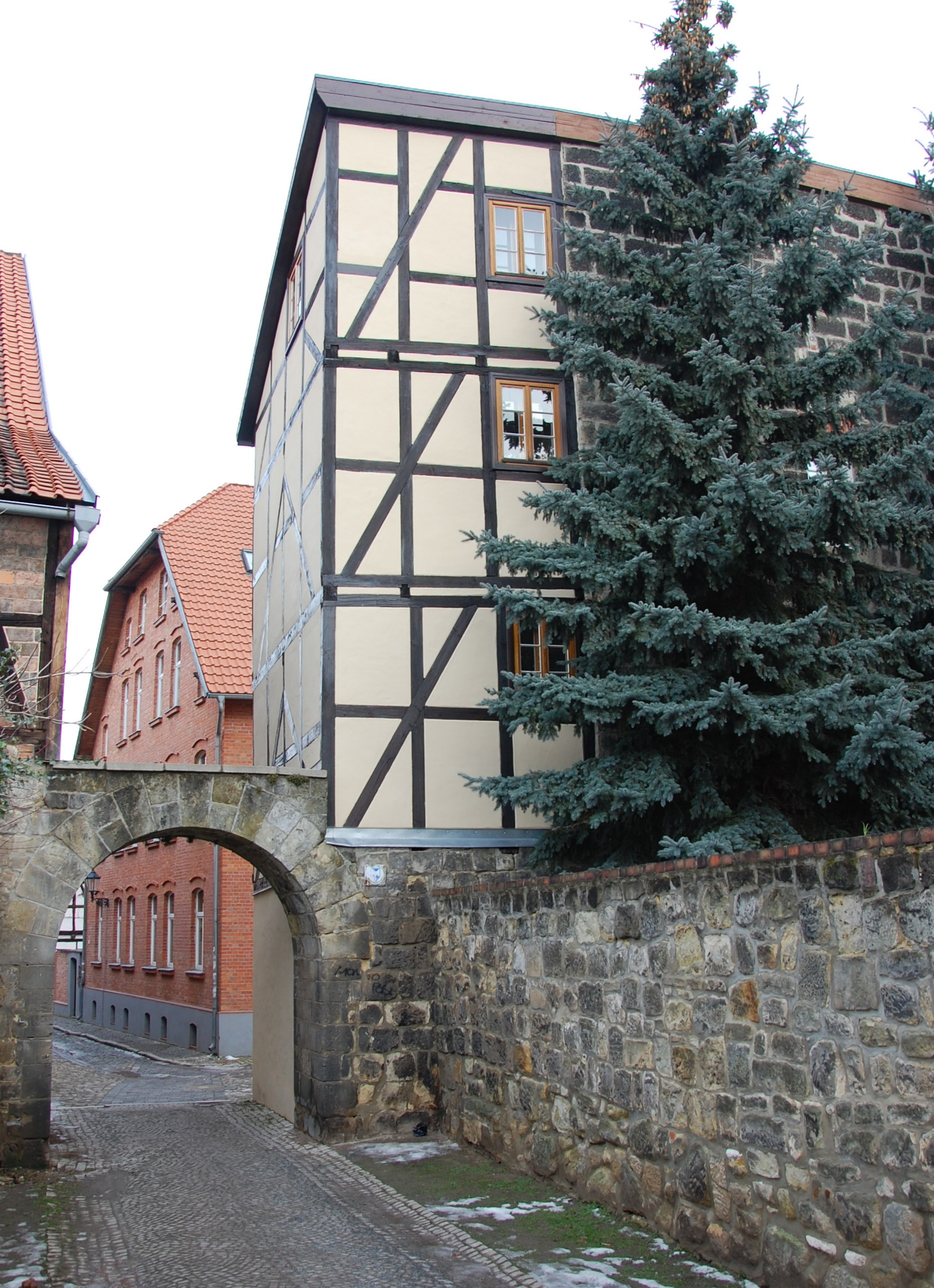 Haus Kaiserstraße 33 in Quedlinburg